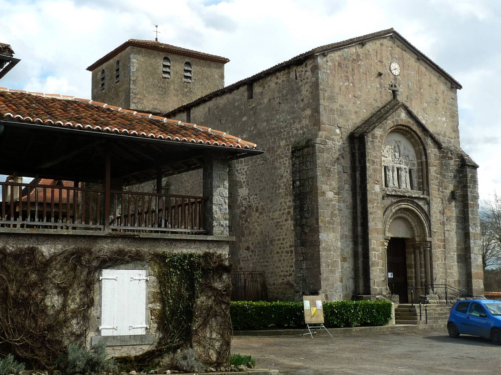 église de Manot, Charente, France